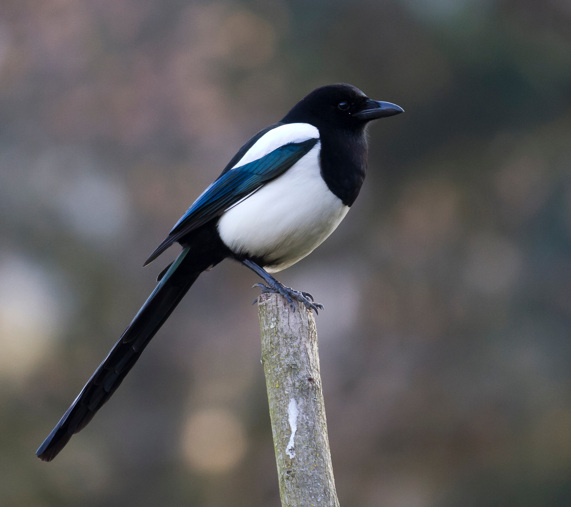 Pie (Pica pica) dans le jardin de Compans Caffarelli à Toulouse